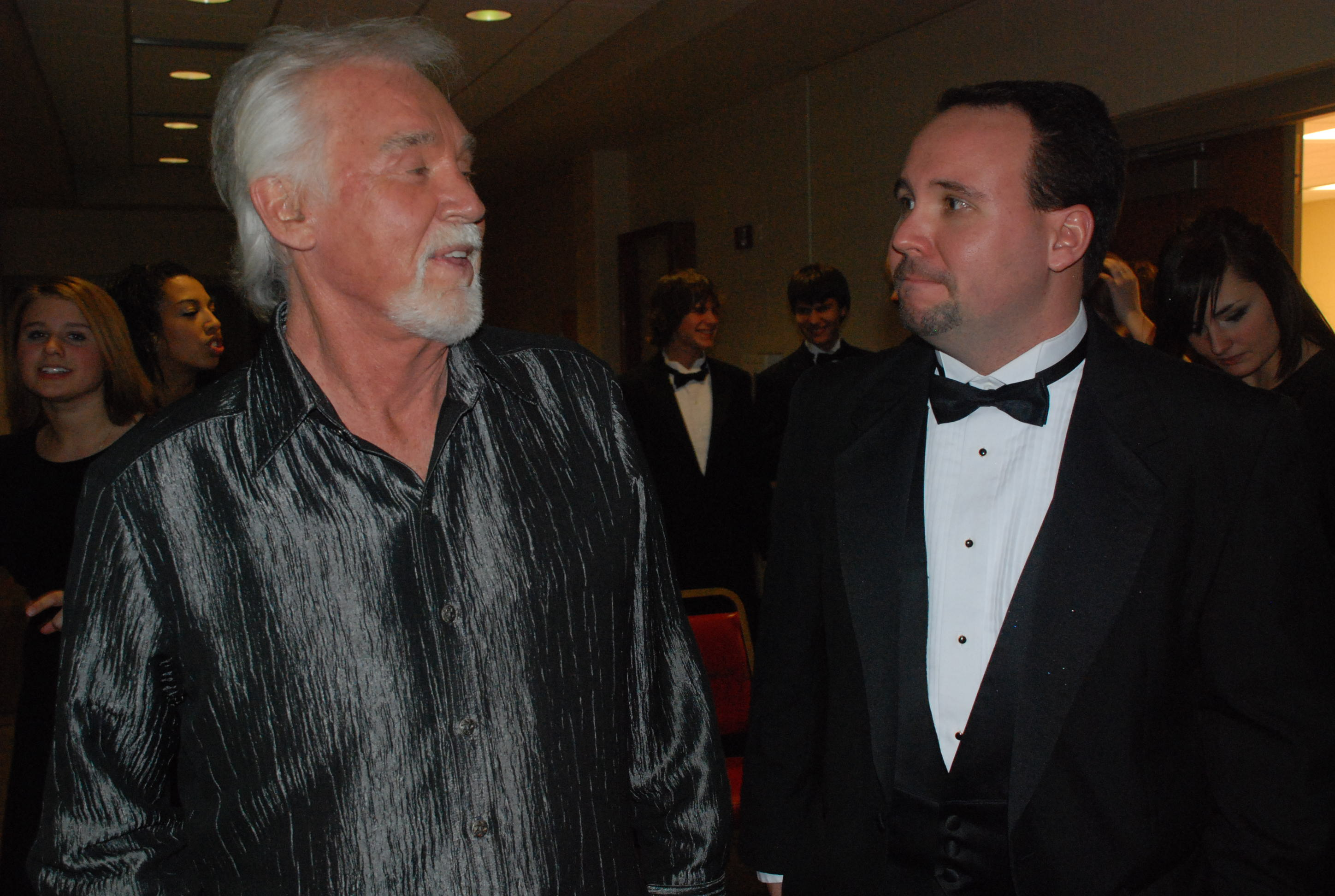 2007 12 02 Kenny Rogers New Gen